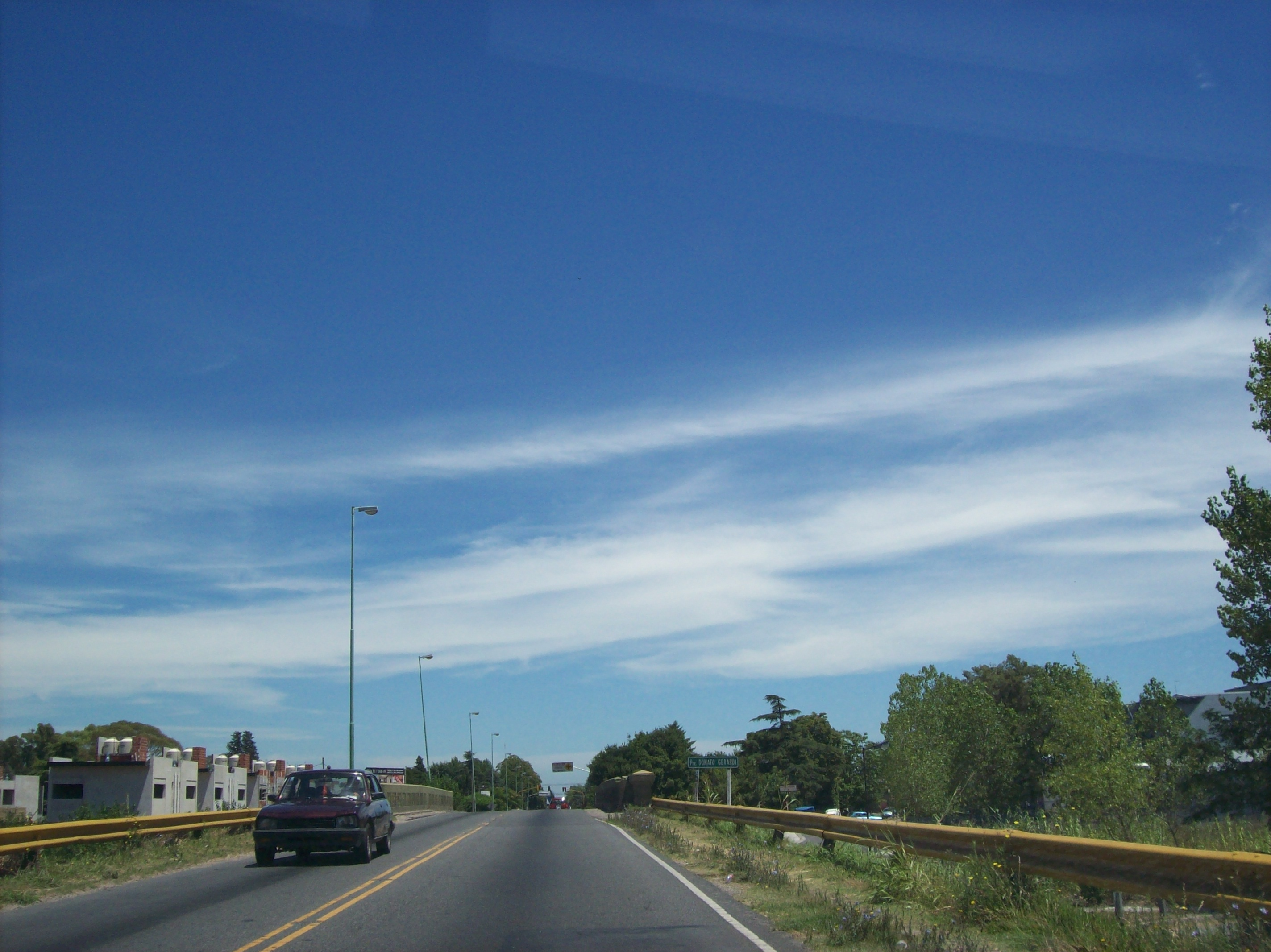 Camino General Belgrano (Ruta Provincial 1) hacia el oeste en Gonnet, partido de La Plata, Provincia de Buenos Aires, Argentina. En el centro de la imagen, puente de hormigón "Donato Gerardi" construido a principios del siglo XX sobre las vías del ferrocarril entre Ringuelet y Brandsen.